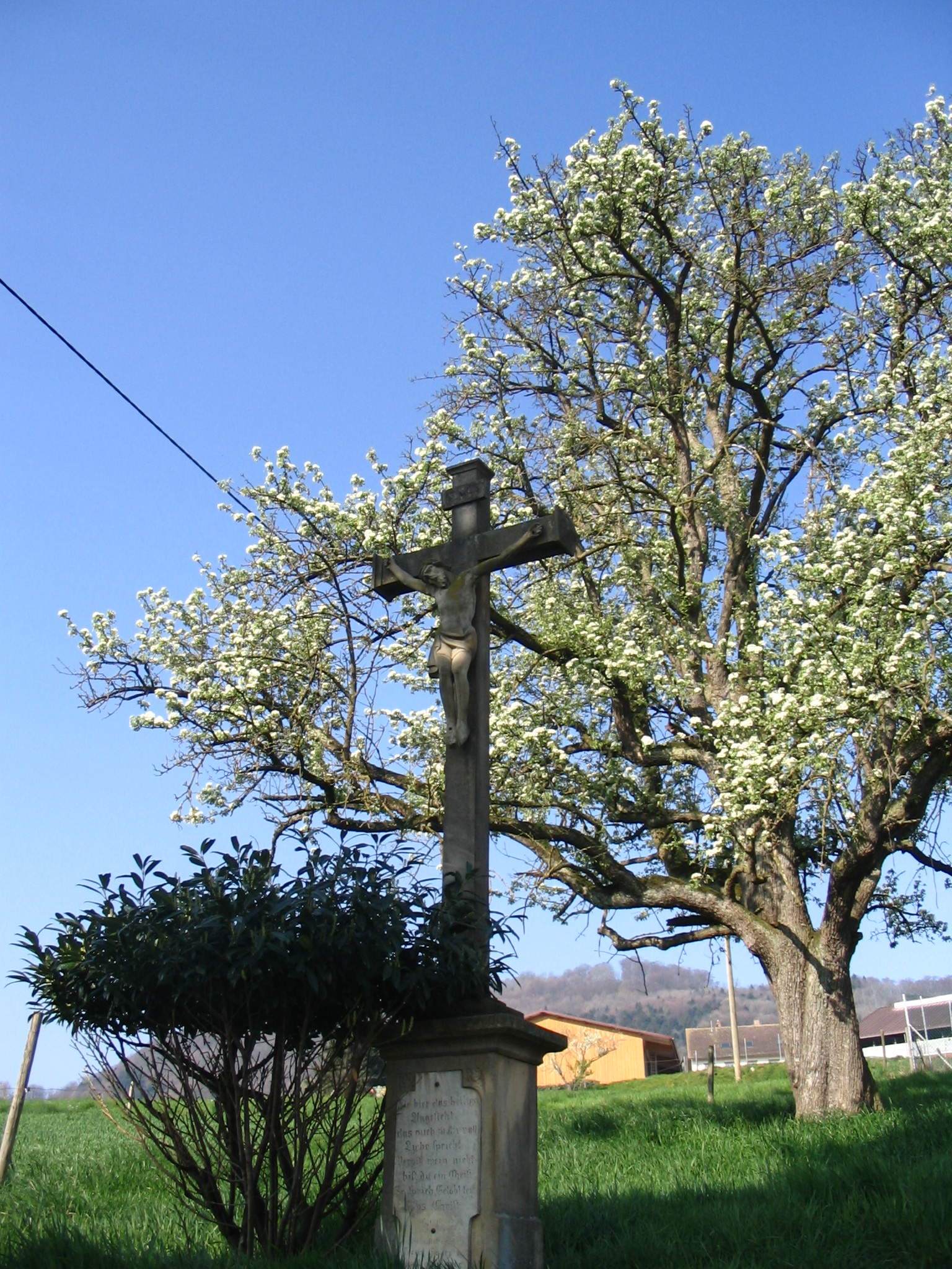 Das Gedenkkreuz unterhalb des Hauerhofes am Bettlerpfad